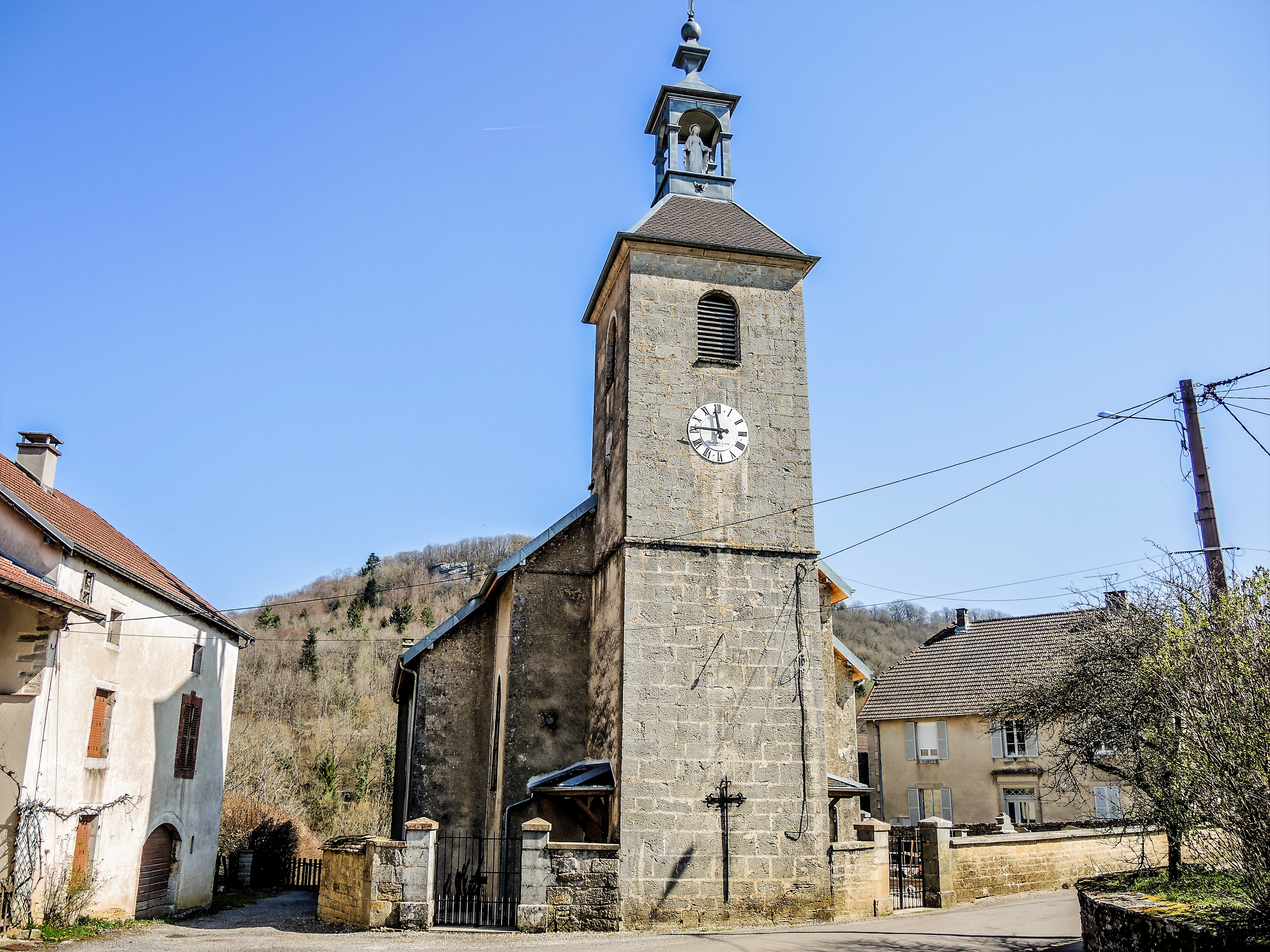 Eglise de Malans